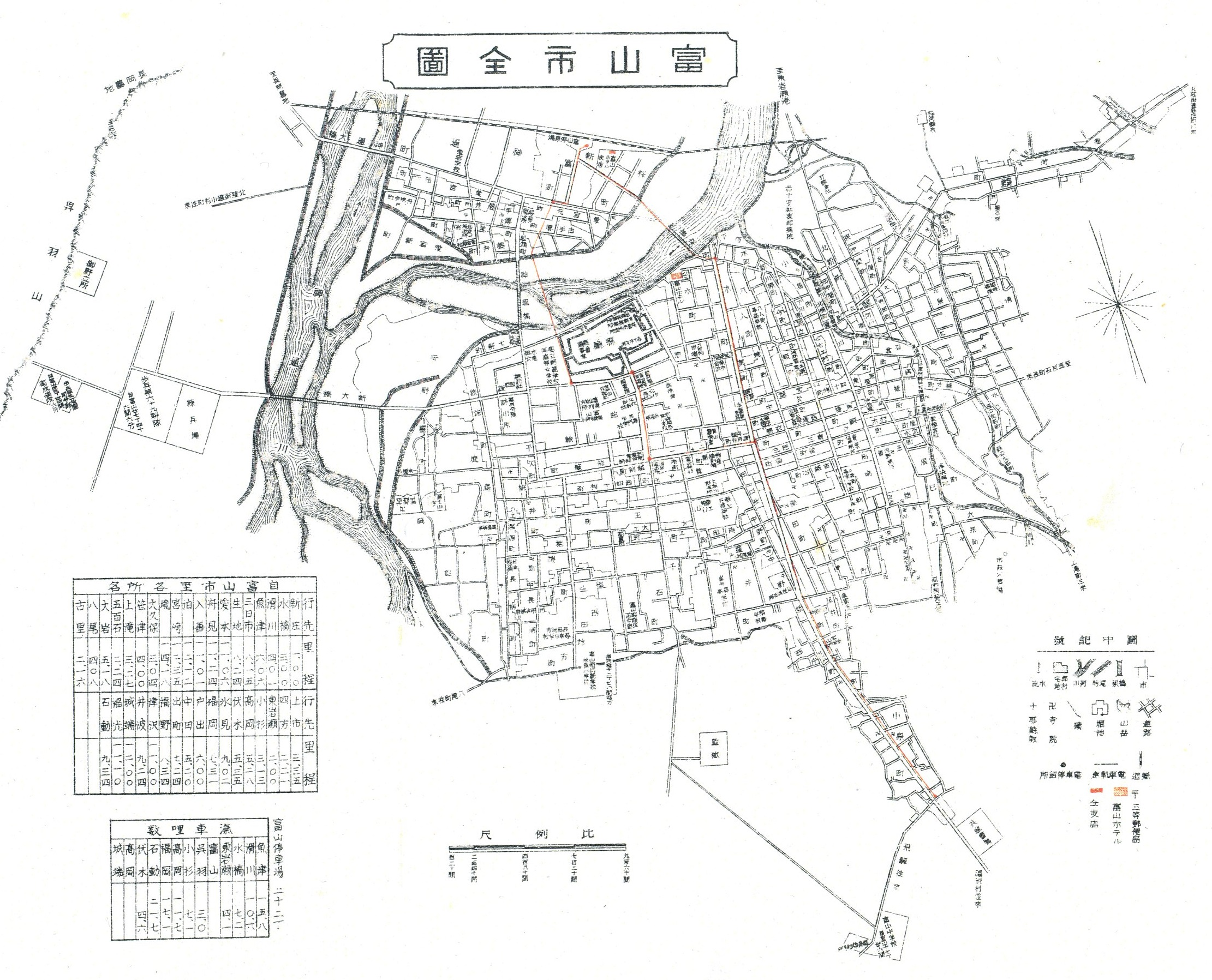 1913年（大正2年）当時の富山市全図。朱色の線は同年9月に開業した富山電気軌道の路線を示す。